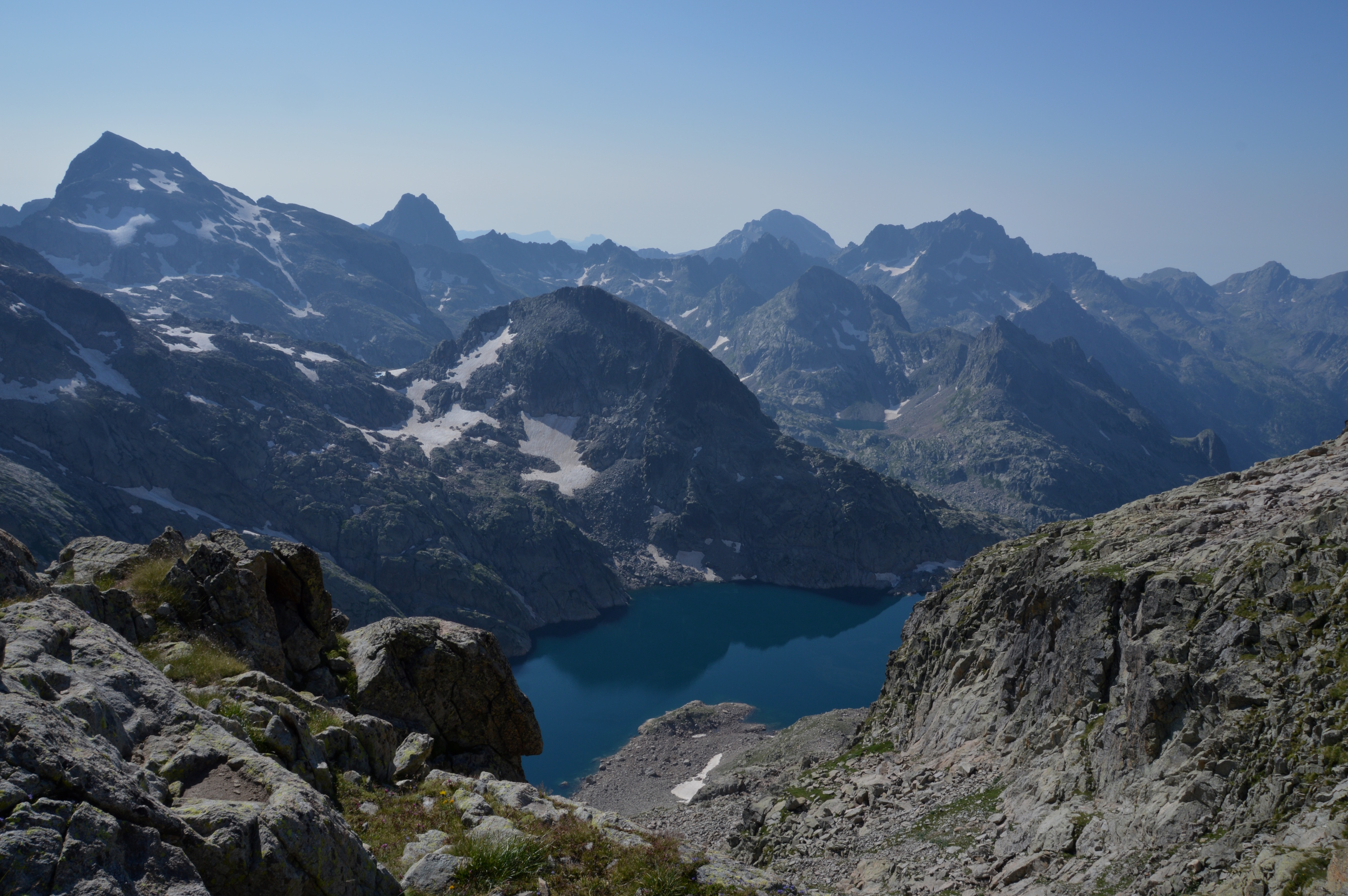 Vue du lac long depuis le pas du Gelas dans le parc national du Mercantour